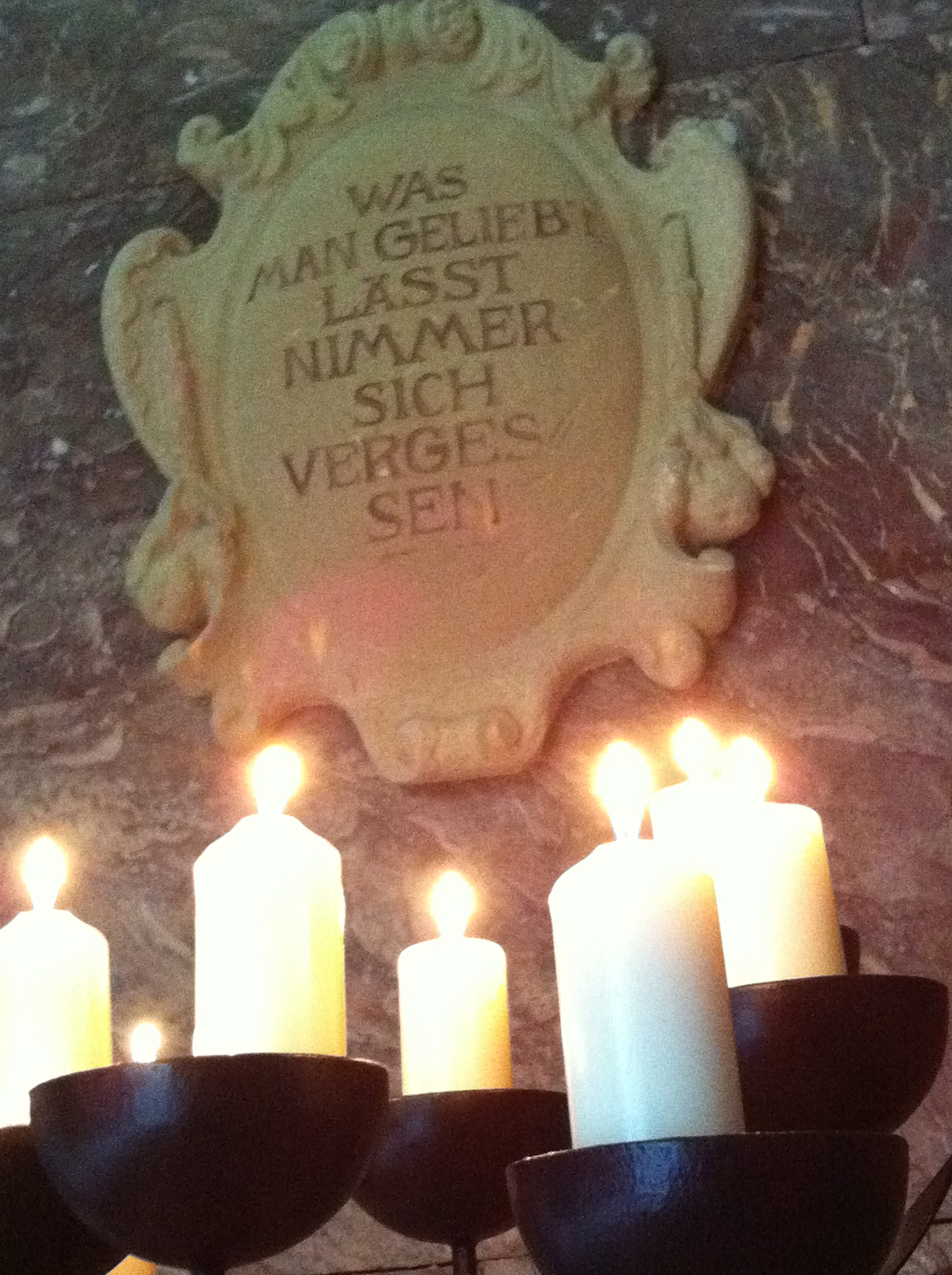 Wennigsen (Deister) Andachtsraum im Mausoleum des Wennigser Friedhofes; aufgenommen am Tag der Eröffnung